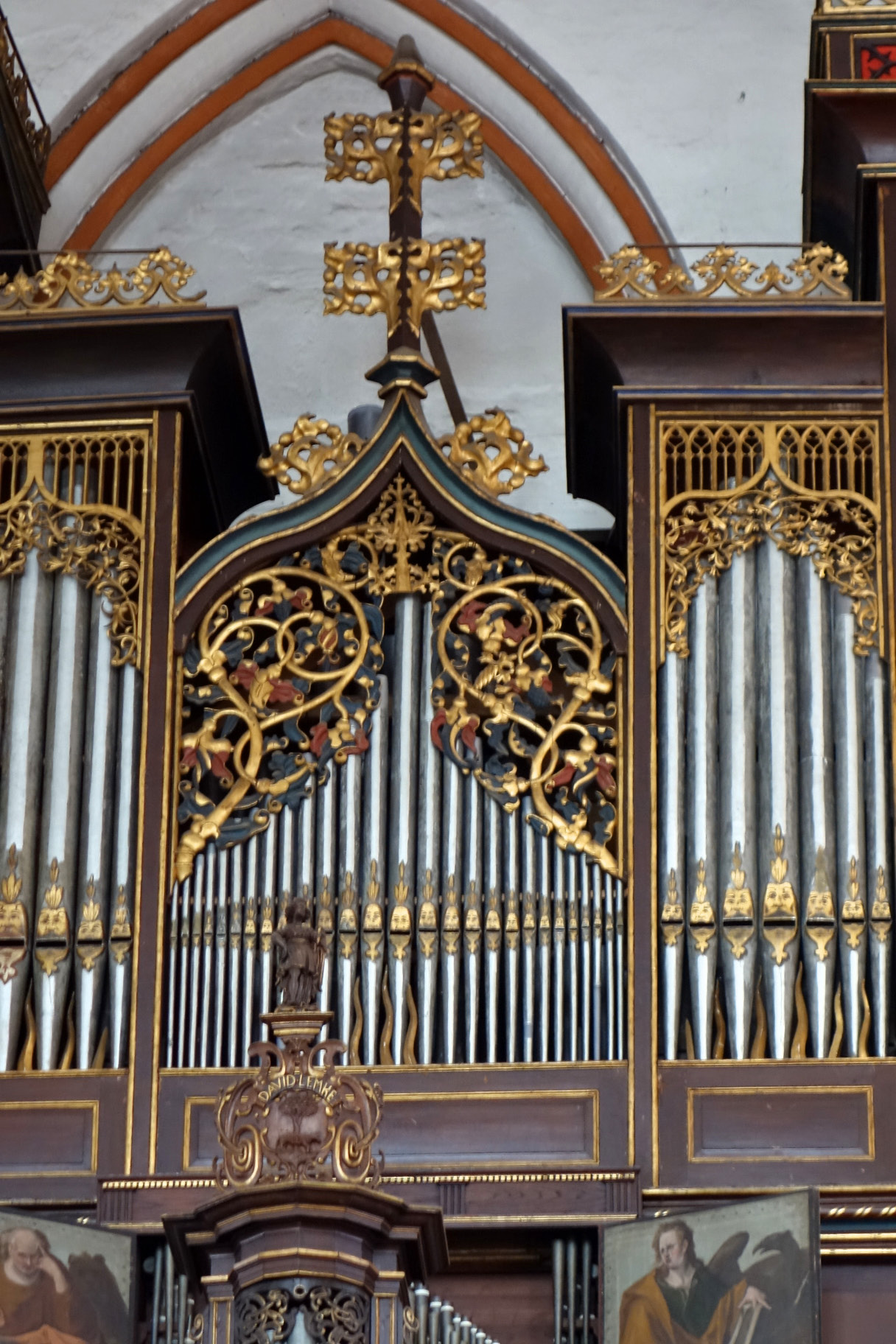 Stellwagen-Orgel in Lübeck, Jakobikirche, Schleswig-Holstein